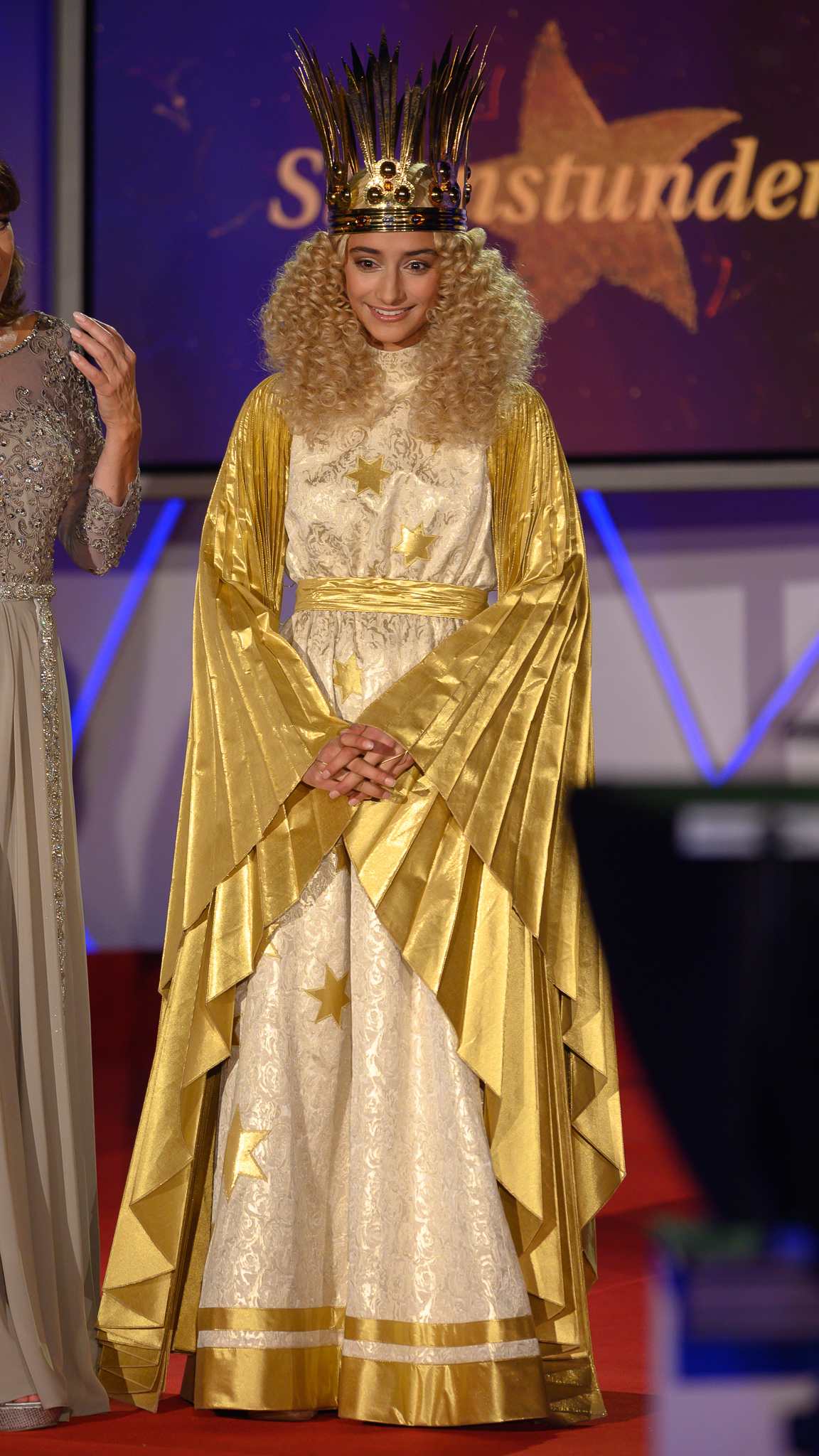 BR,Bayerisches Fernsehen,Benigna Munsi,Frankenhalle,Live-Sendung,Nürnberger Christkind,Sternstunden-Gala,Sternstundengala